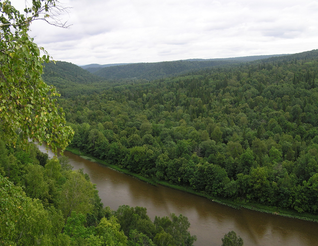 Долина реки Лемеза (1)